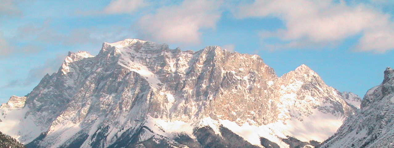 Wettersteinmassiv vom Parkplatz Fernpass aus gesehen. Der Gipfel der Zugspitze (ganz links) wird von den Gebäuden auf dem Gipfelplateau verdeckt. Man erkennt gut die Schichtung im rechten Teil (südlichen) des Wettersteingebirges, die sich zur Zugspitze selbst hin verliert. Das markiert den Übergang zwischen massigen Riffkalken und den gebankten Lagunenkalken.